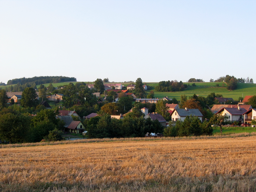 Obec Mezilesí